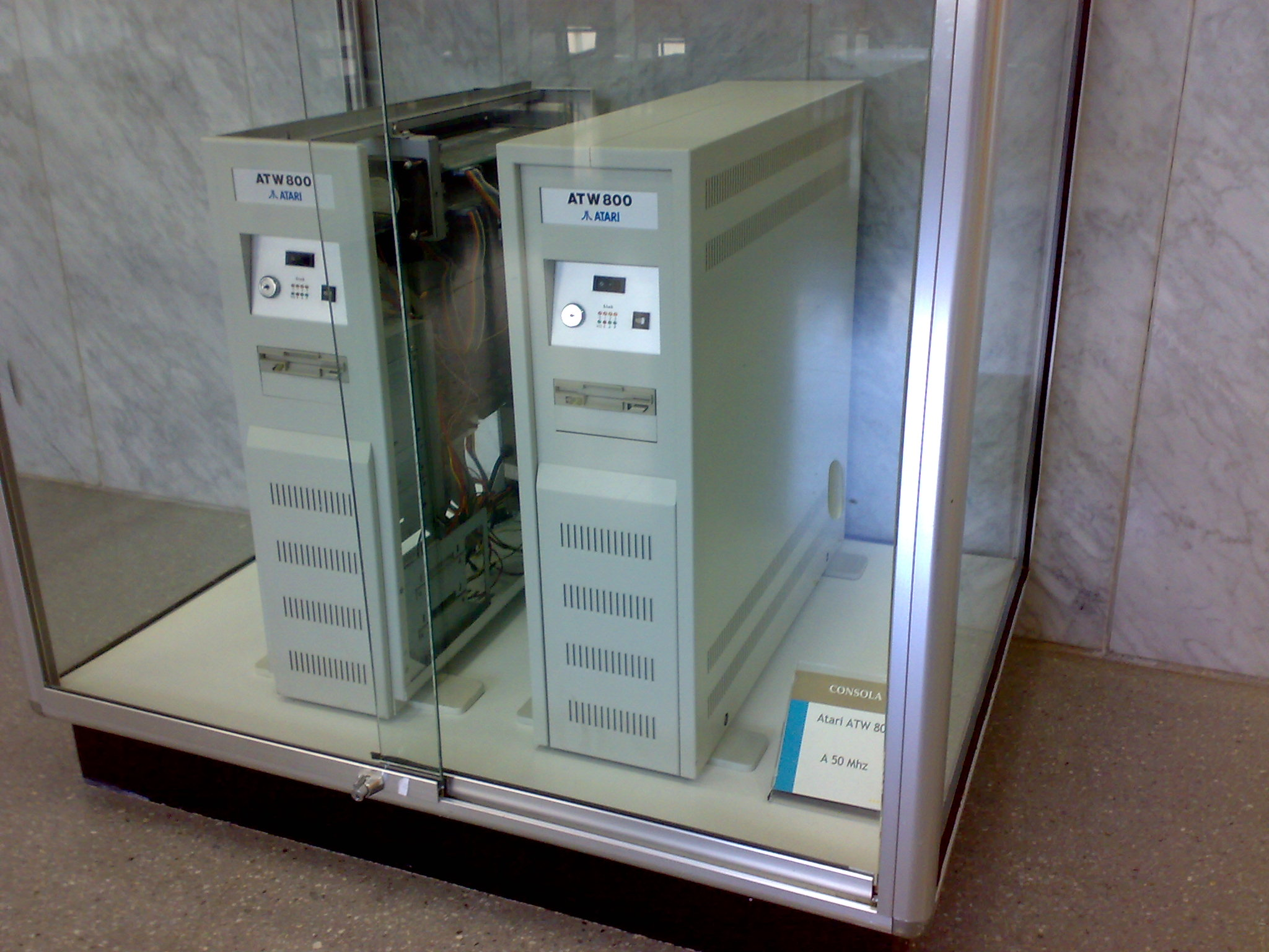 Atari AWT 800 expuesta en la Universidad Politécnica de Valencia